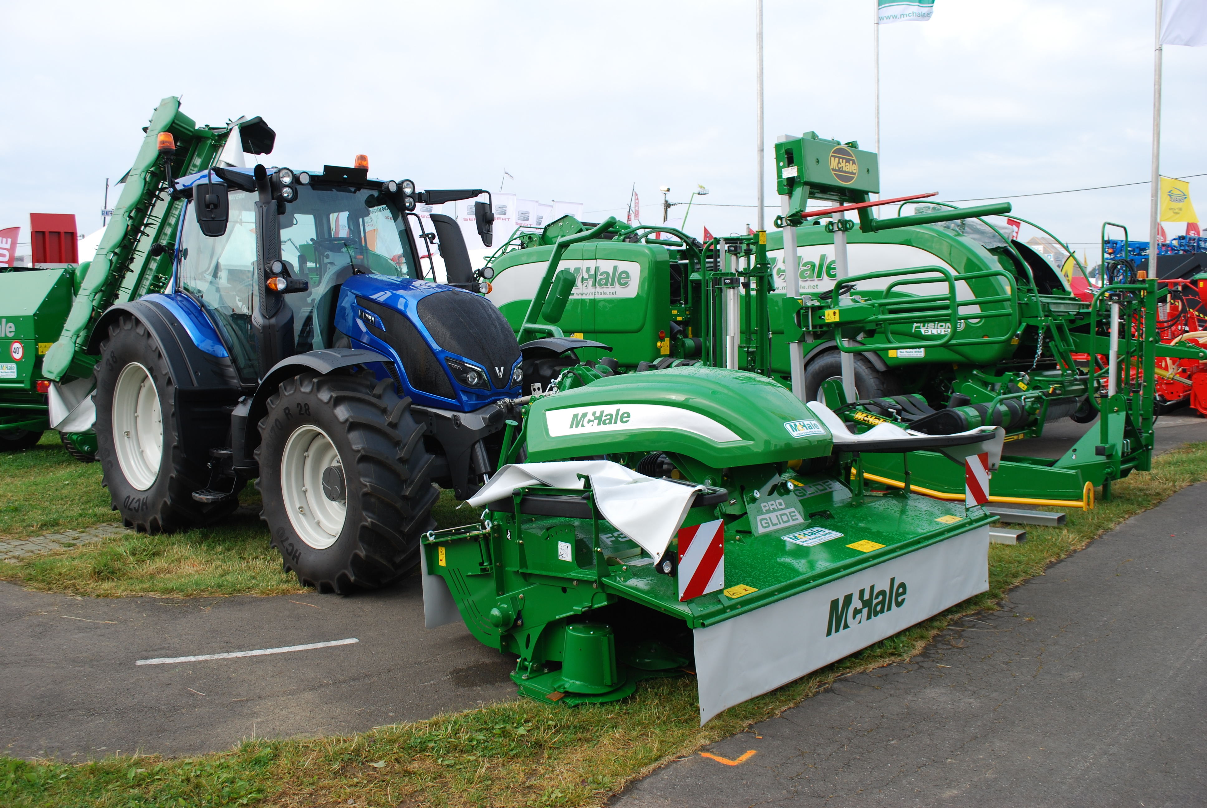 Vue de la Foire agricole de Libramont, dans le Luxembourg belge (82e édition en 2016).